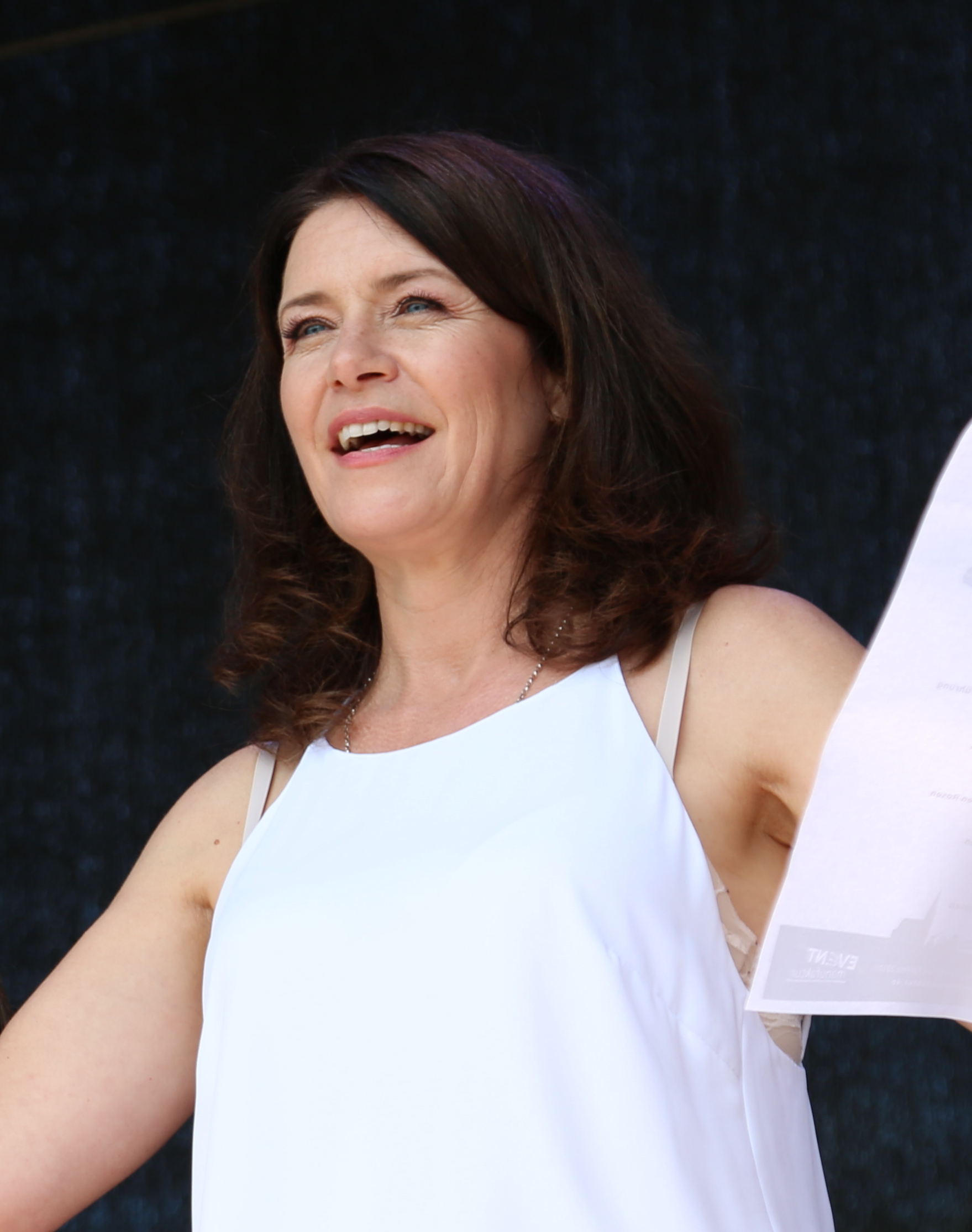 Patricia Schäfer zieht Losnummern beim "Rote Rosen"-Fantag 2017, am 18.06.2017 in Lüneburg.